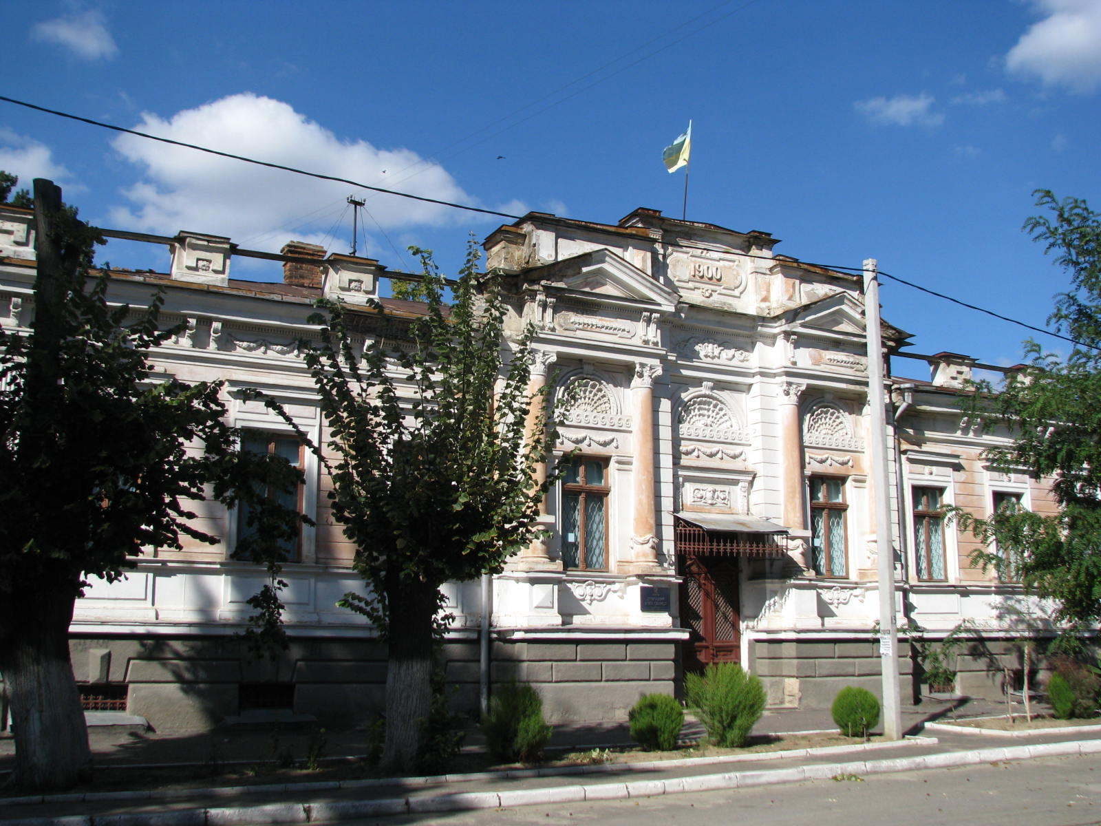 Будинок купця Медведєва, Херсон, В. Петренка вул., 6